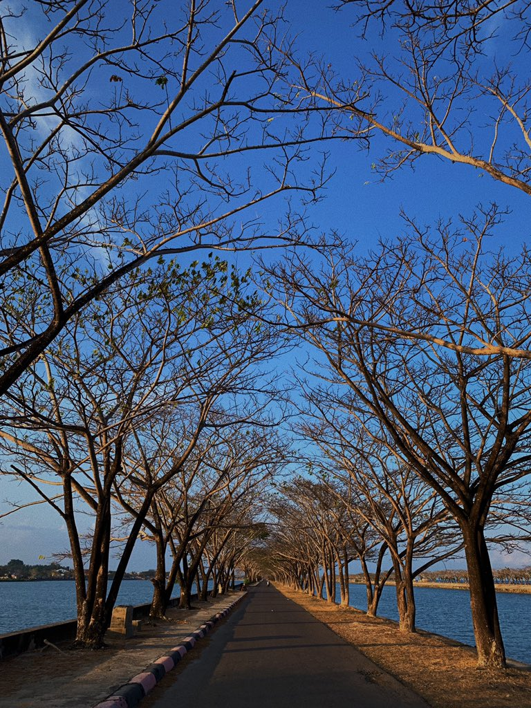 salah satu jalan di kawasan SOR kota Raha